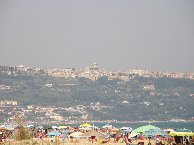 Vasto